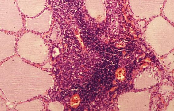 Tiroiditis de de Hashimoto, incipient. Microscopi òptic. 60X. Detall. Tinció: H&E.